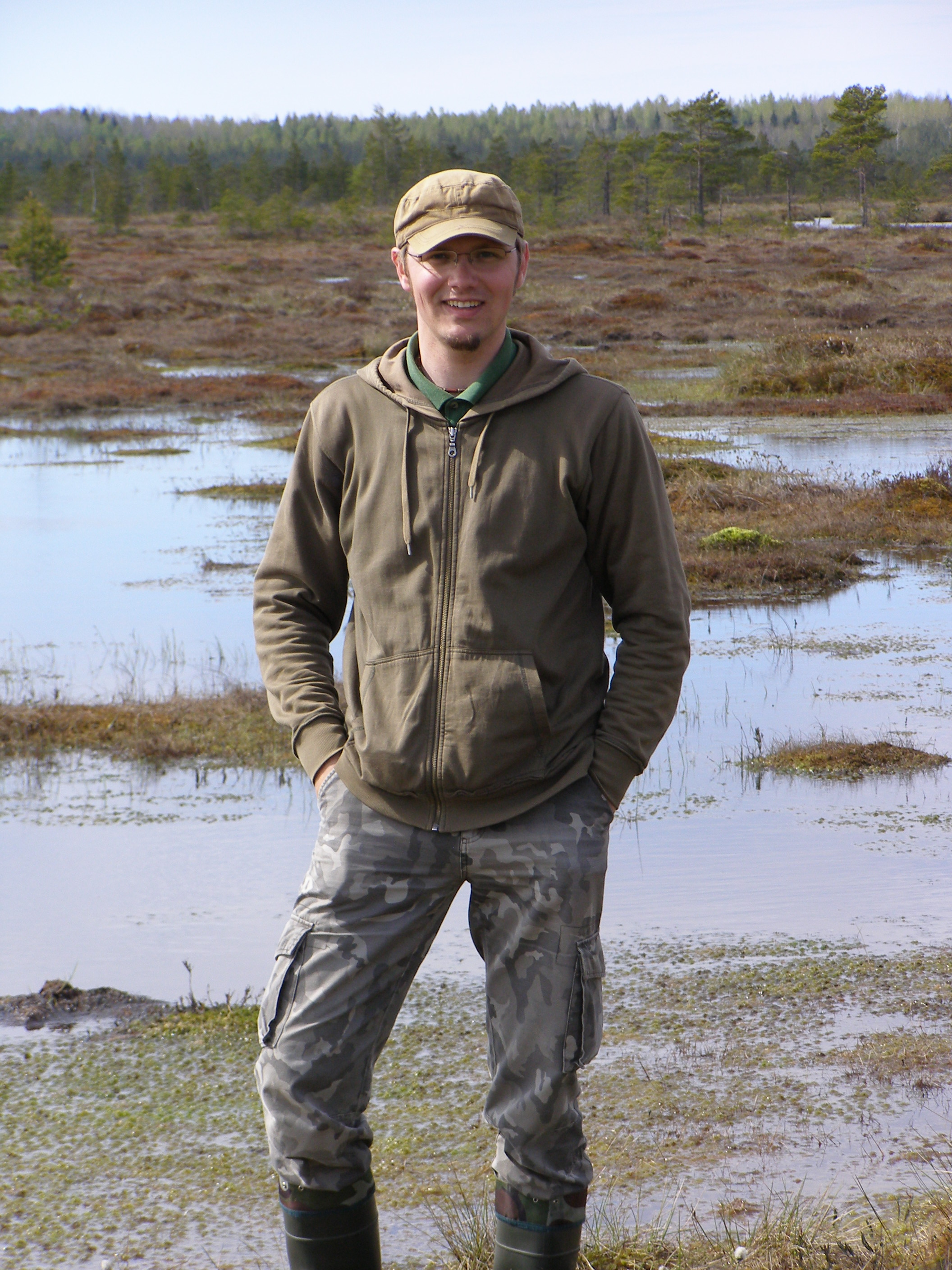 Ulvar Käärt 2009. aasta märtsi lõpus Sirtsi looduskaitsealal.